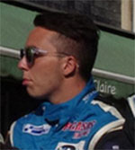 Léo Roussel lors de la parade des pilotes des 24 Heures du Mans 2014